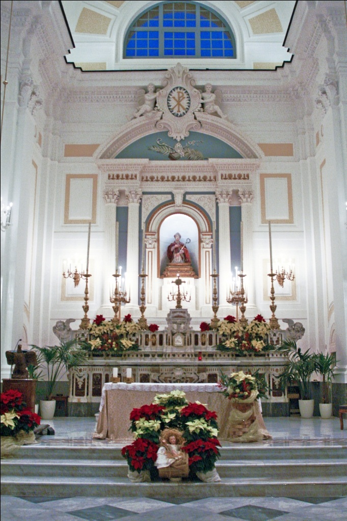 Altare San Gennaro al Vomero